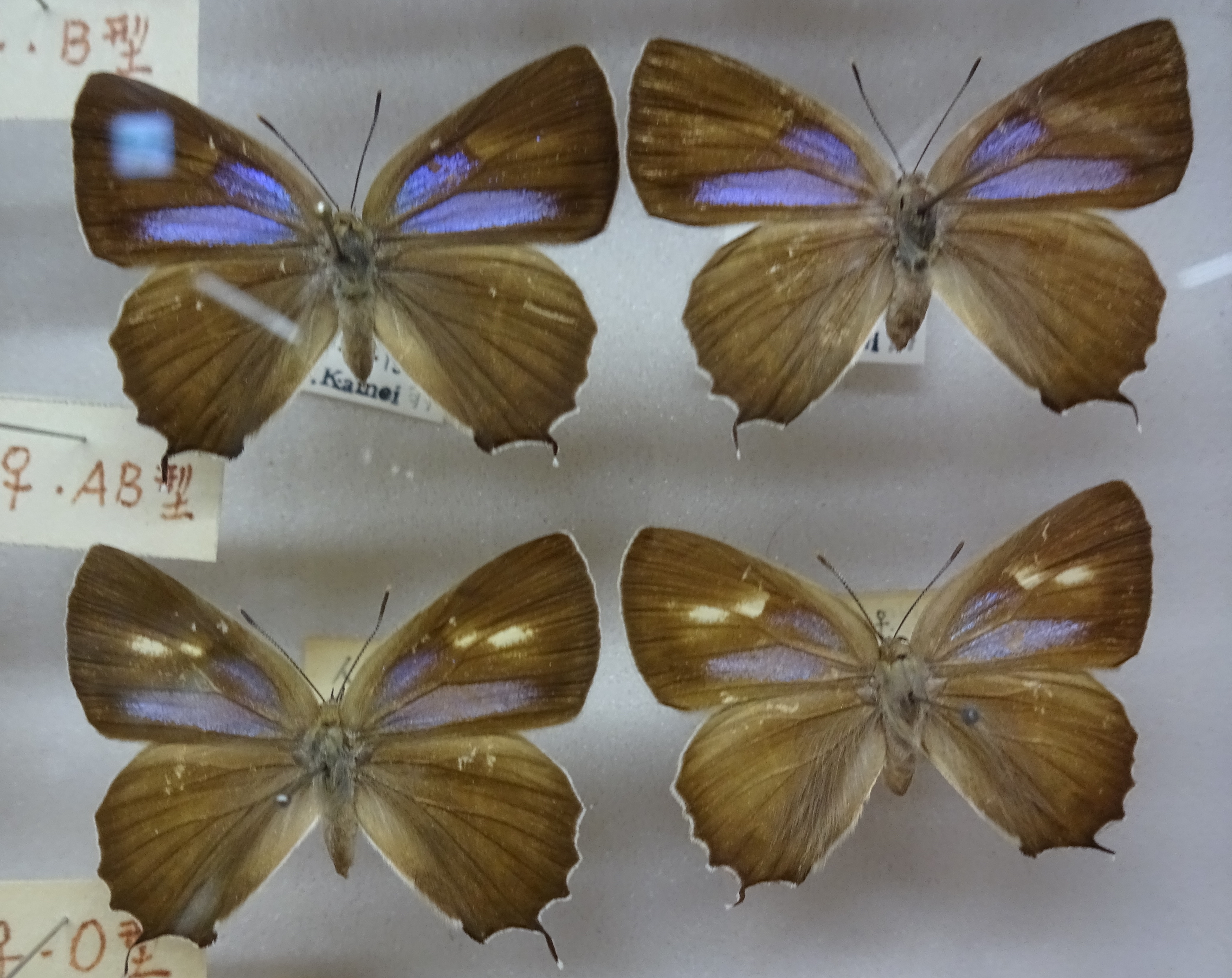 ミドリシジミ